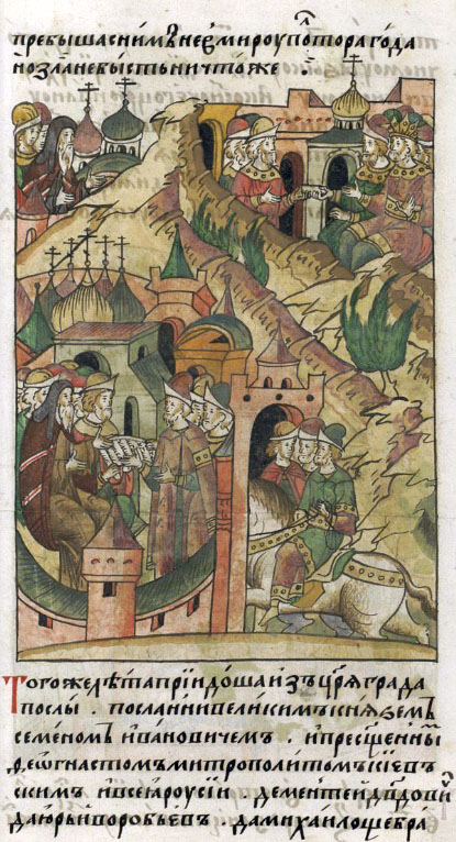 ЛИЦЕВОЙ ЛЕТОПИСНЫЙ СВОД. Возвращение посольства из Царьграда в Москву в 1353 году. В том же году пришли из Царьграда послы, посланные великим князем Семеном Ивановичем и преосвященным Феогностом, митрополитом Киевским и всея Руси: Дементий Давыдович да Юрий Воробьев, и митрополичьи послы: Артемий Коробьин да Михайло Щербатый, грек.